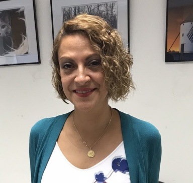 Jineth Bedoya en Madrid presentación Manual para periodistas para el tratamiento sobre violencia de género. Organización Internet Oxfam